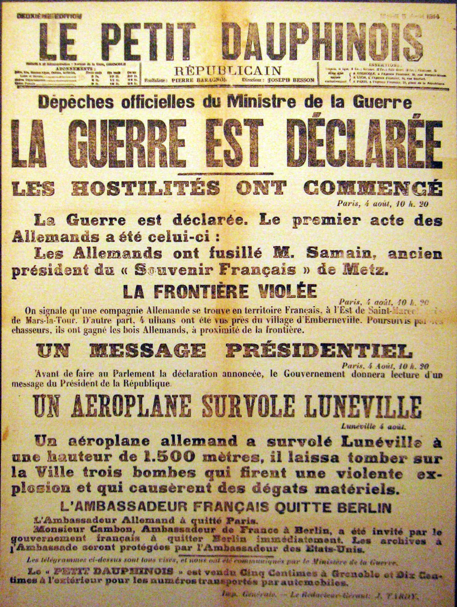 Le Petit Dauphinois 1914, déclaration de guerre.